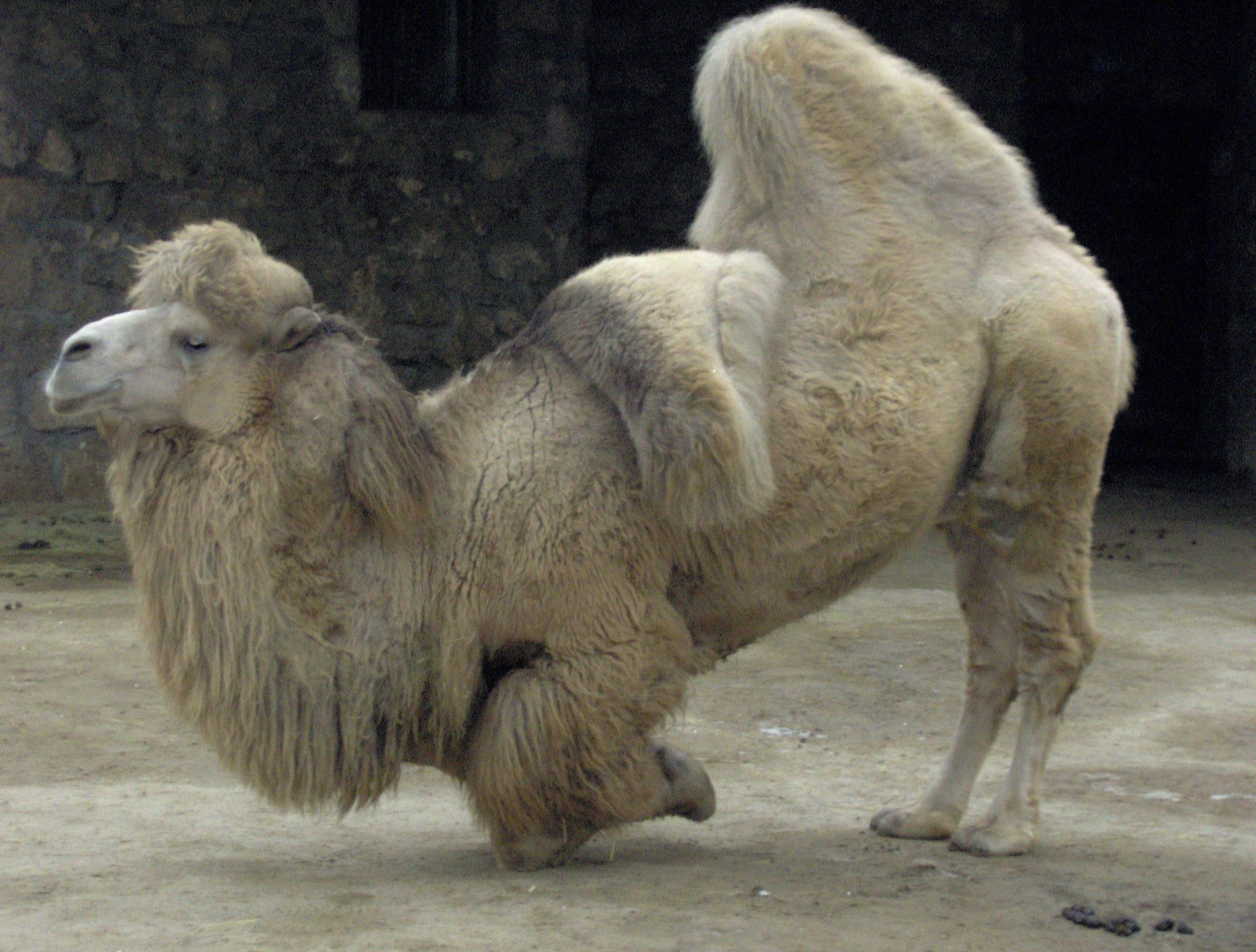 Camelus bactrianus